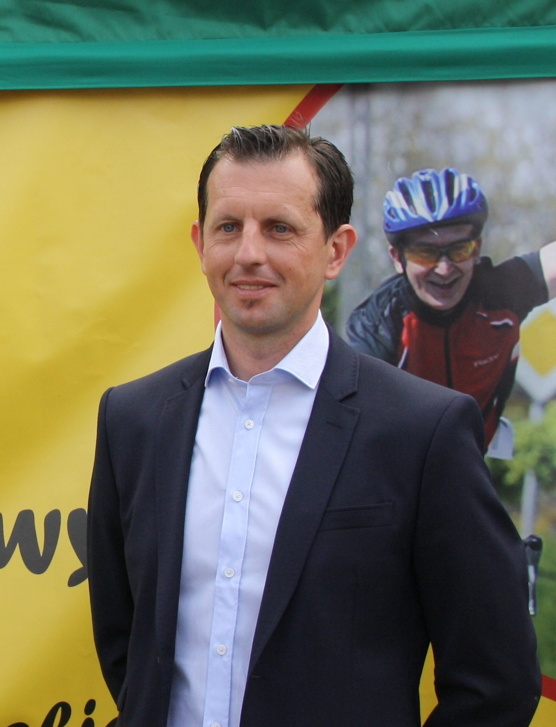 Dariusz Baranowski podczas Wyścigu Rowerowego po Ziemi Zgierskiej Tour do Powiat w Głownie